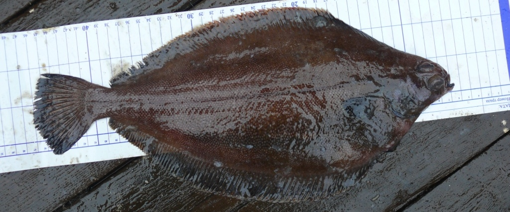 Зрячая сторона. Длина AC около 40 см